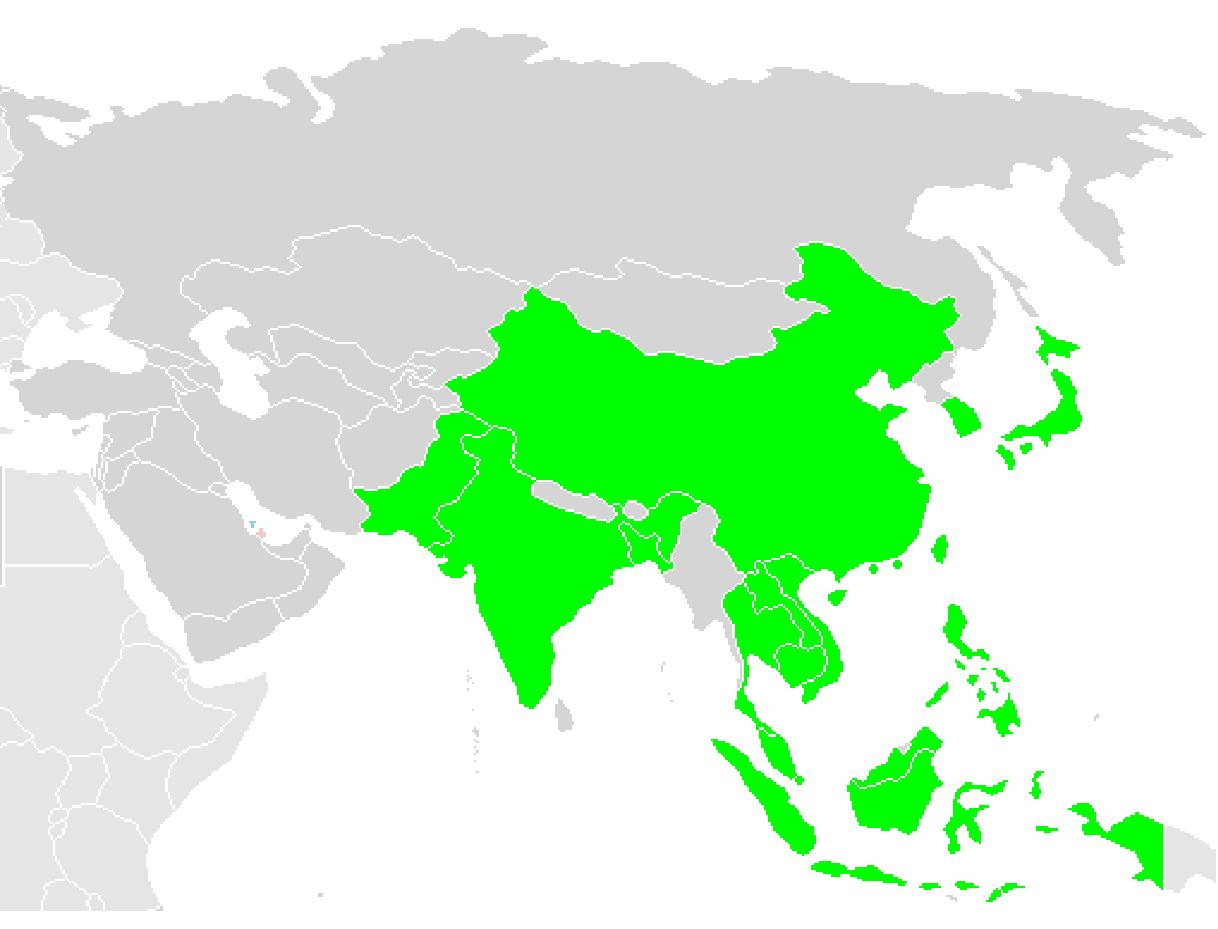 Países participantes no Festival Ásiavisão 2009